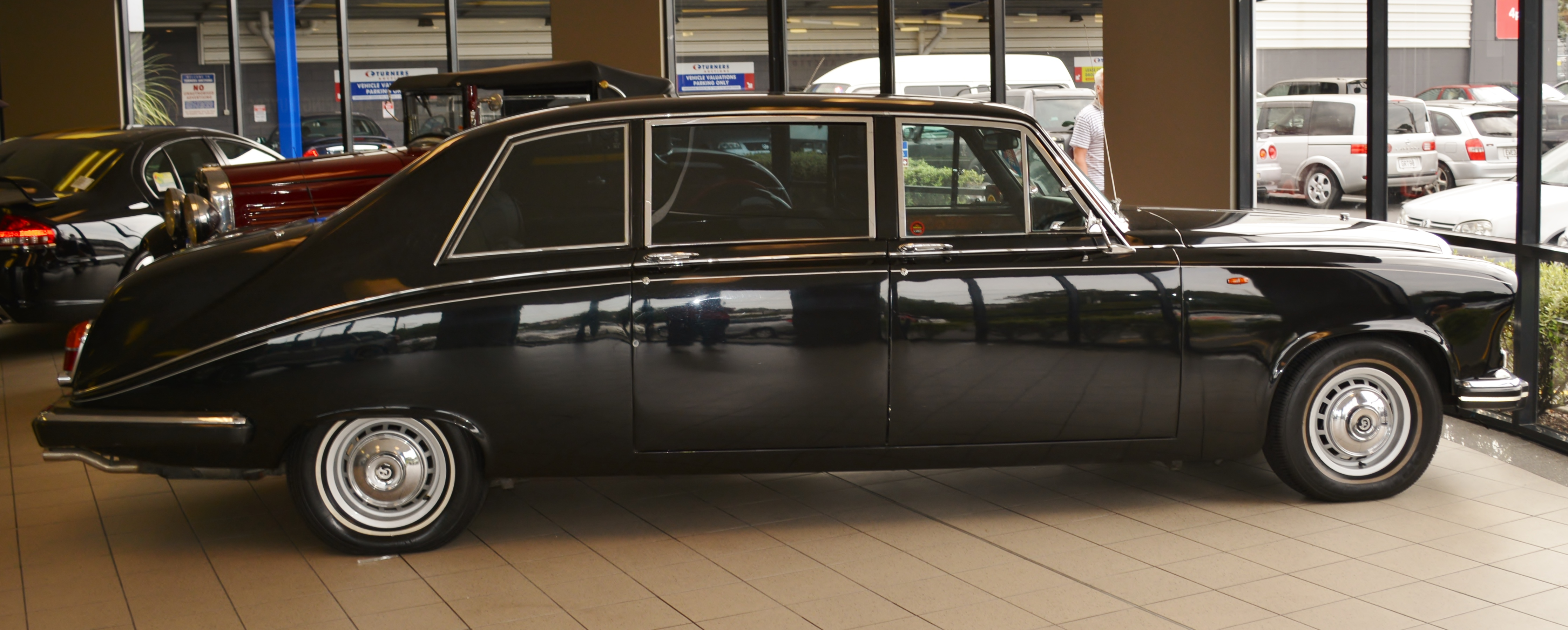 1988 Daimler DS420 LimousineAuckland, New Zealand